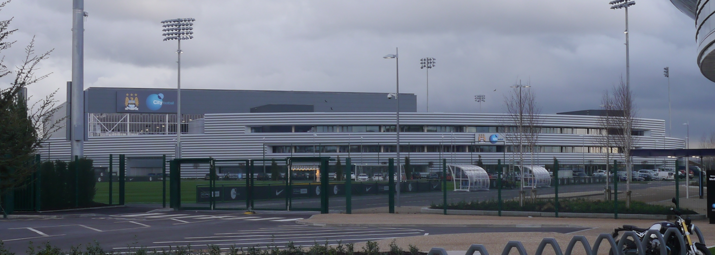 Le nouveau centre d'entraînement de Manchester City.